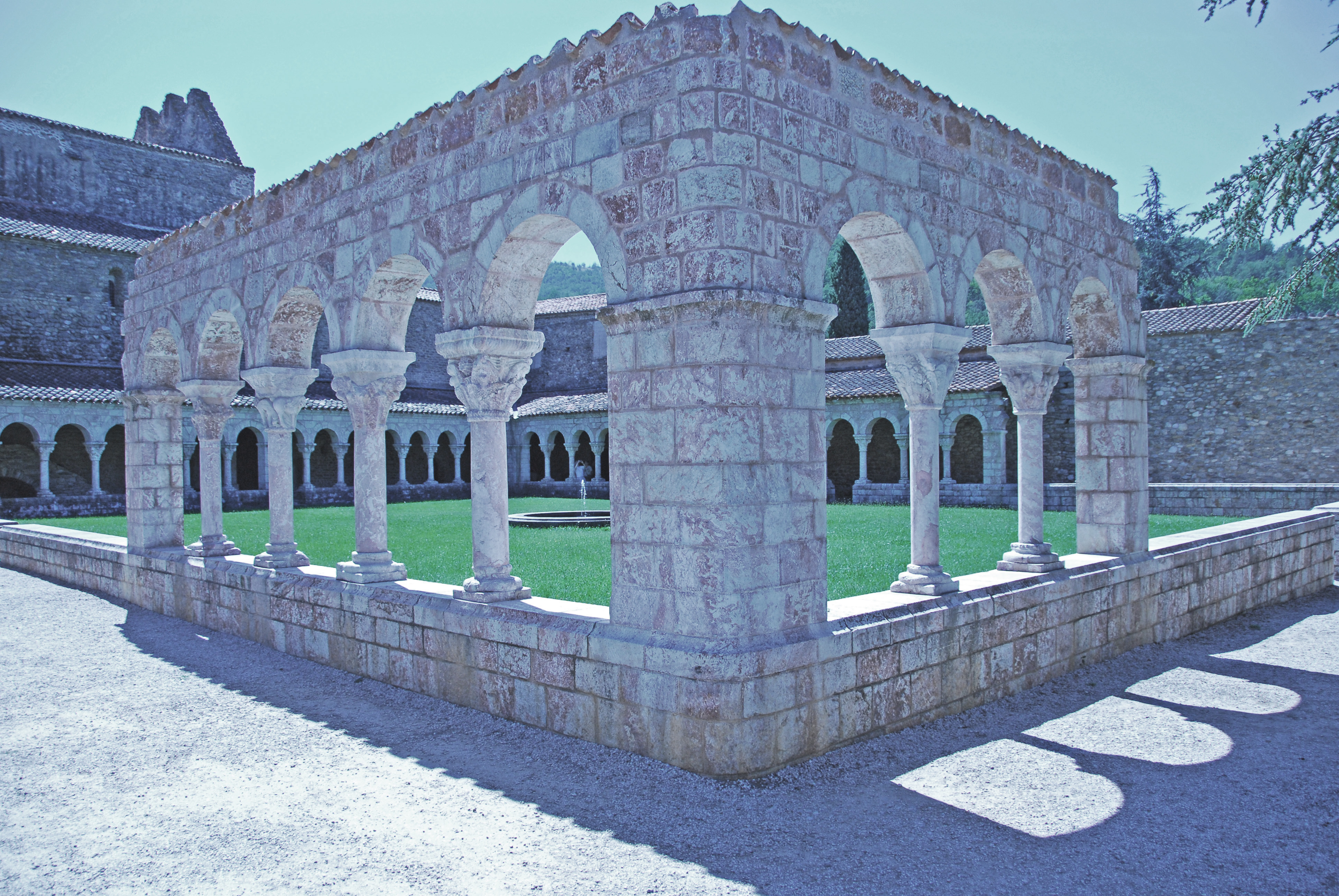 Abbaye Michel-de-Cuxa, Kreuzgang, Nordecke